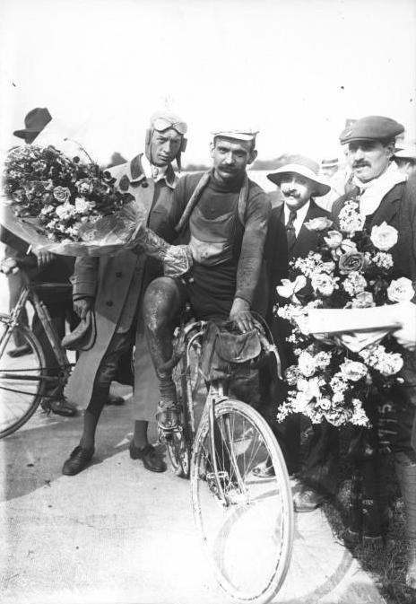 Gustave Garrigou, entouré de spectateurs, à l'arrivée du Tour de France 1913